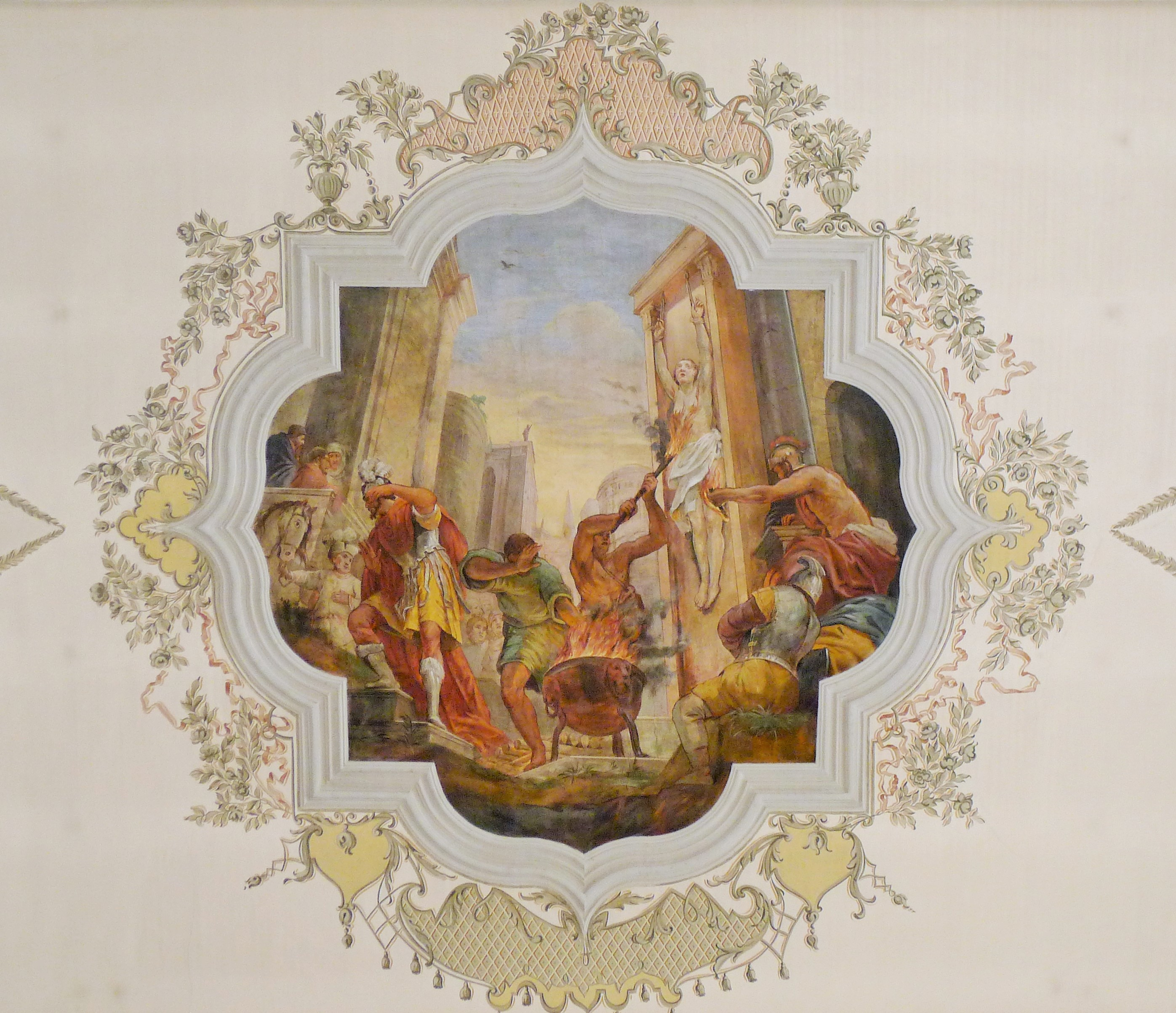 Margarethens Märtyrium - Deckengemälde von Franz Bernhard Altenburger, St. Margarethen (Waldkirch)